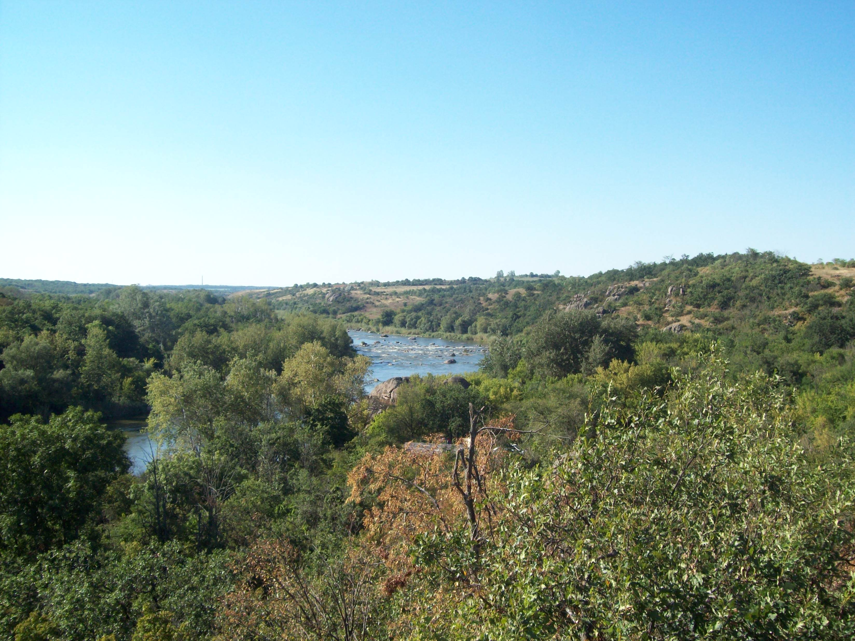 На цю гірку непросто вилазити, але краєвид чудовий. Звук від порогів чути на сотні метрів